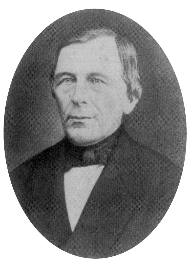 portret van Teunis Braams (1820-1893), burgemeester van Gasselte en Anloo